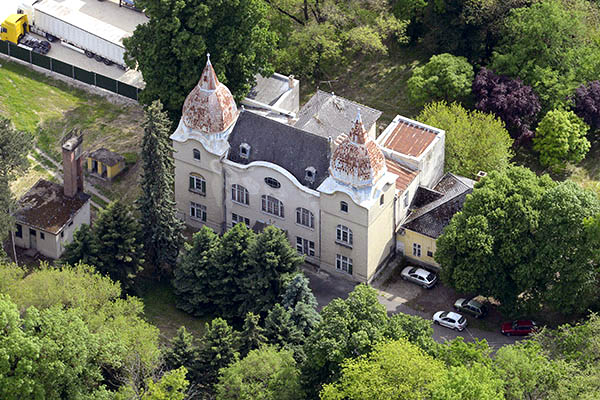 Légi fotó a Droppa-kastélyról, Mezőszilas